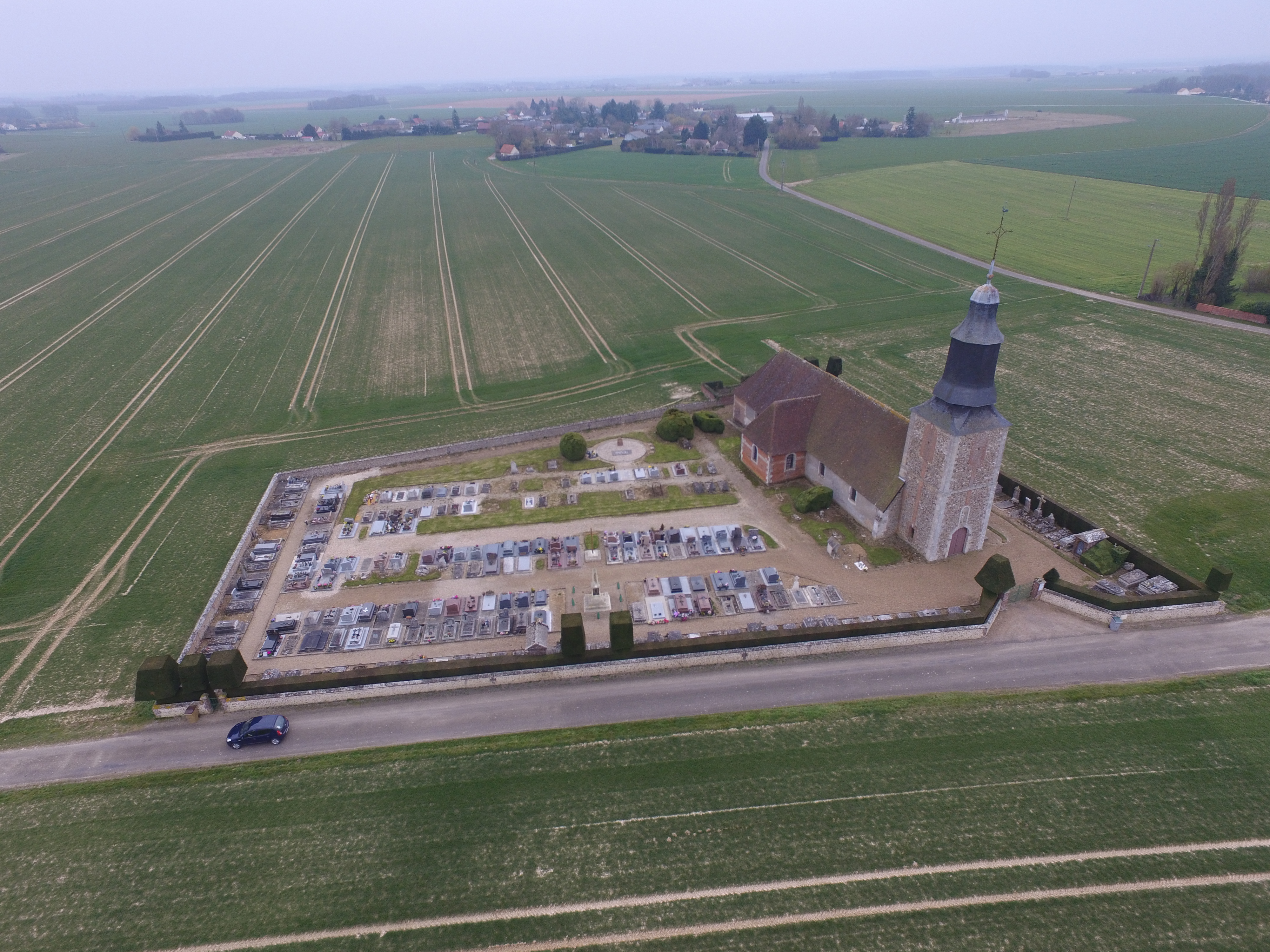 EGLISE DE LA COMMUNE HISTORIQUE DES ESSARTS